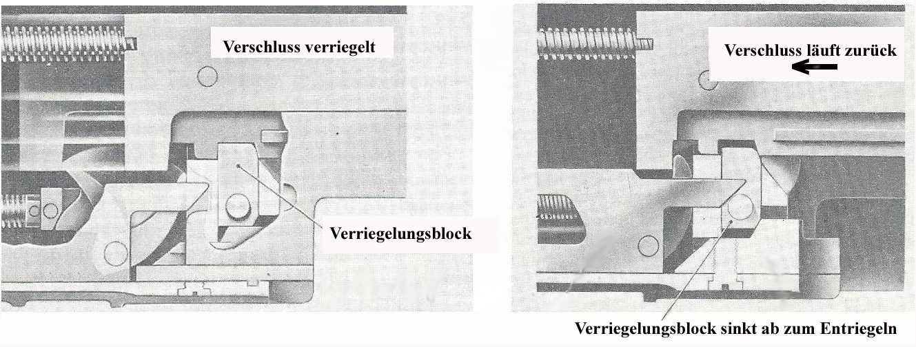 Browning M1917 Verriegelung